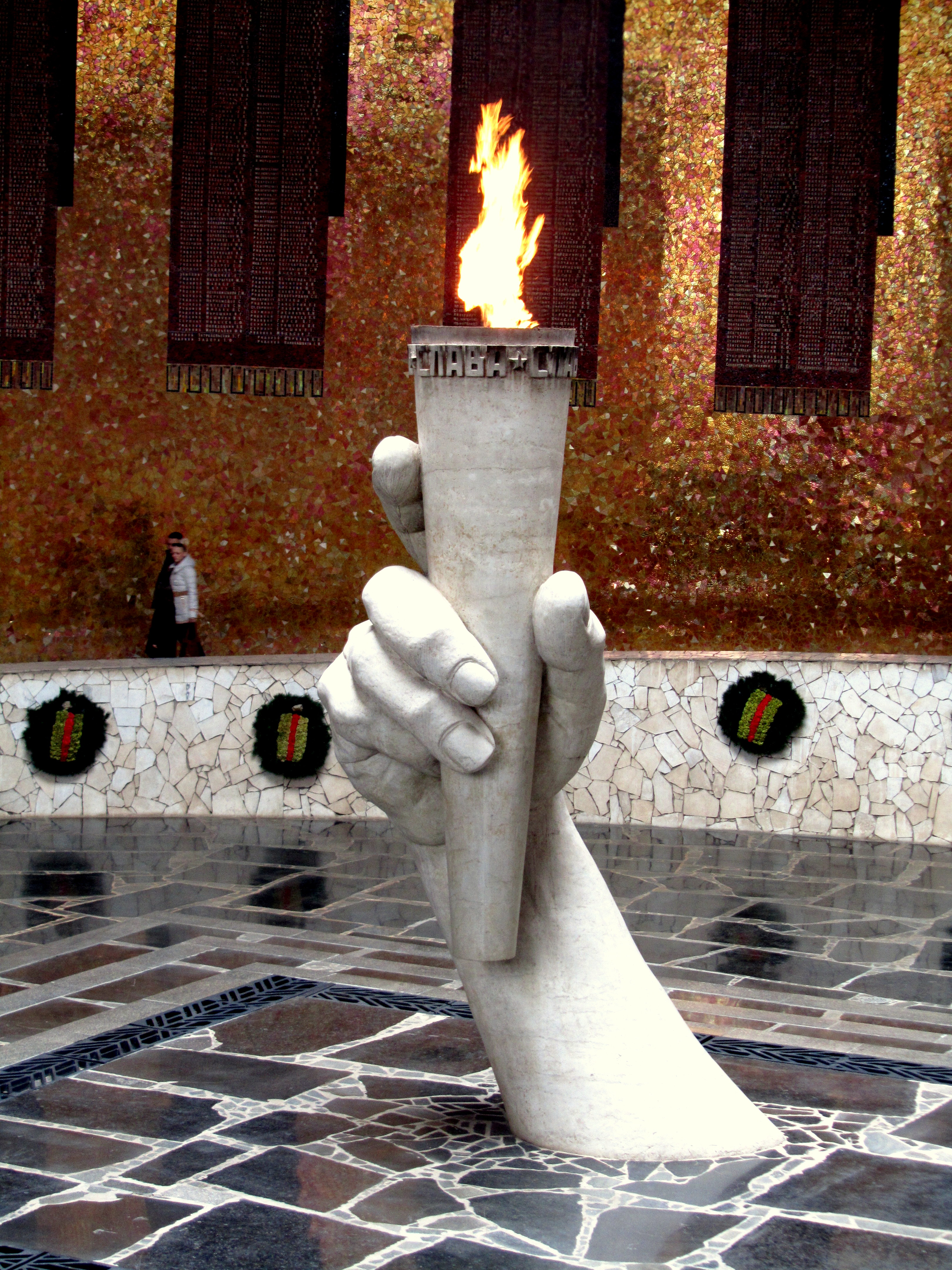 Зал Воинской Славы: площадь Скорби, Центральный район, Волгоград, Волгоградская область